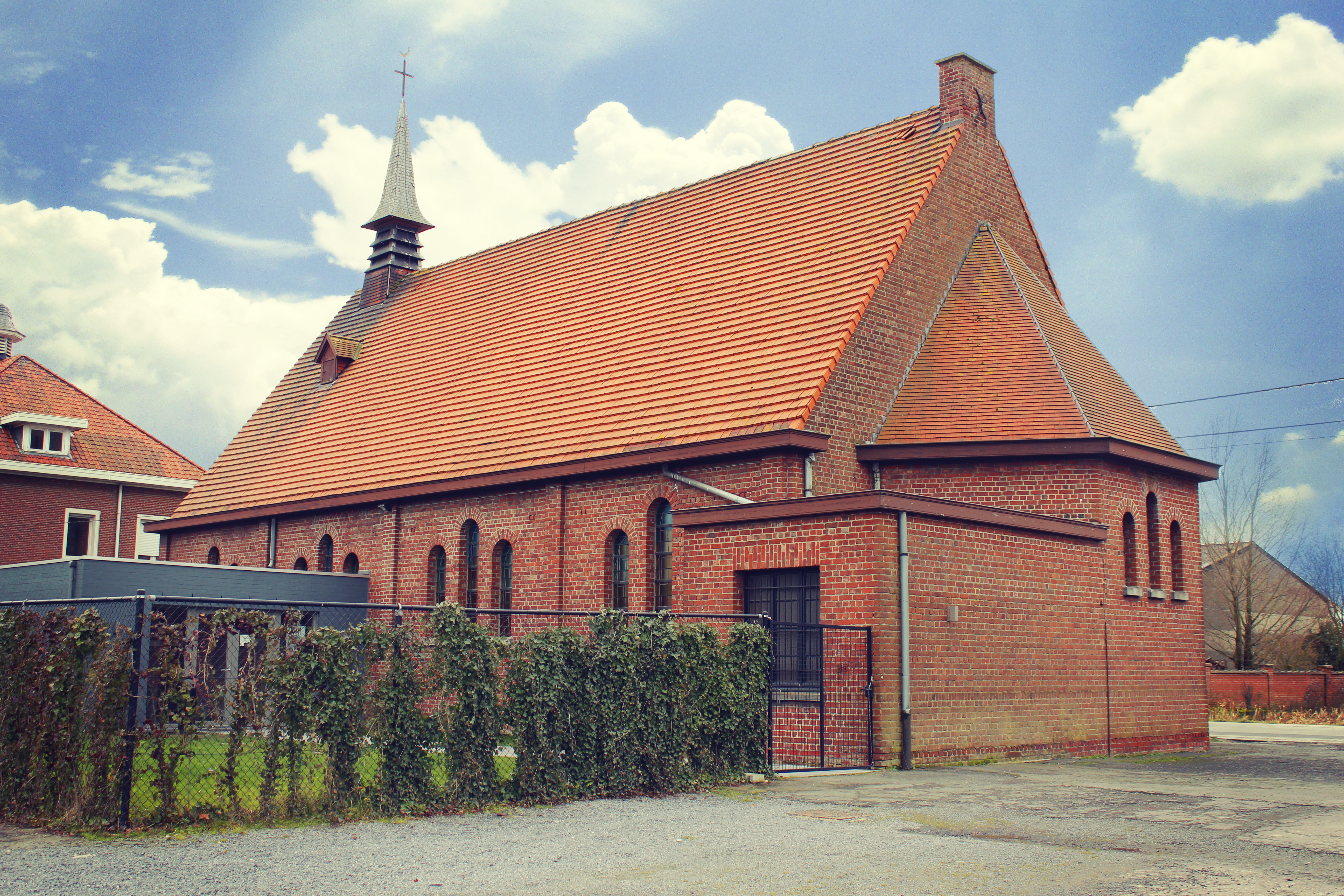 Buitenaanzicht kapel